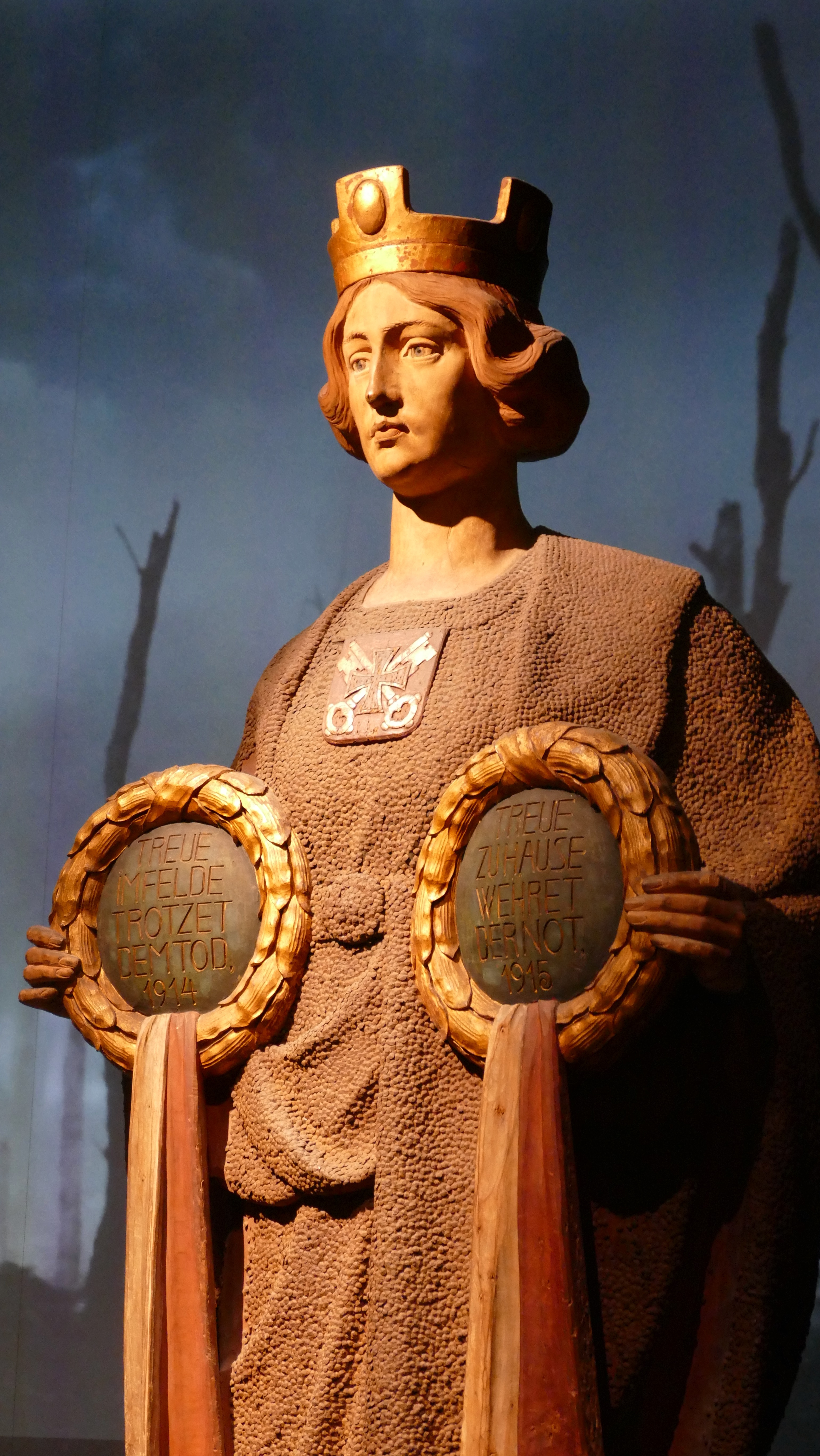 Haus der Bayerischen Geschichte: Museum: Ratisbona (Kriegsnagelung). Die Fotografie ist im Rahmen der Wikipedianische KulTour am 24. November 2019 entstanden. Mit der freundlichen Freigabe des Hauses der Bayerischen Geschichte